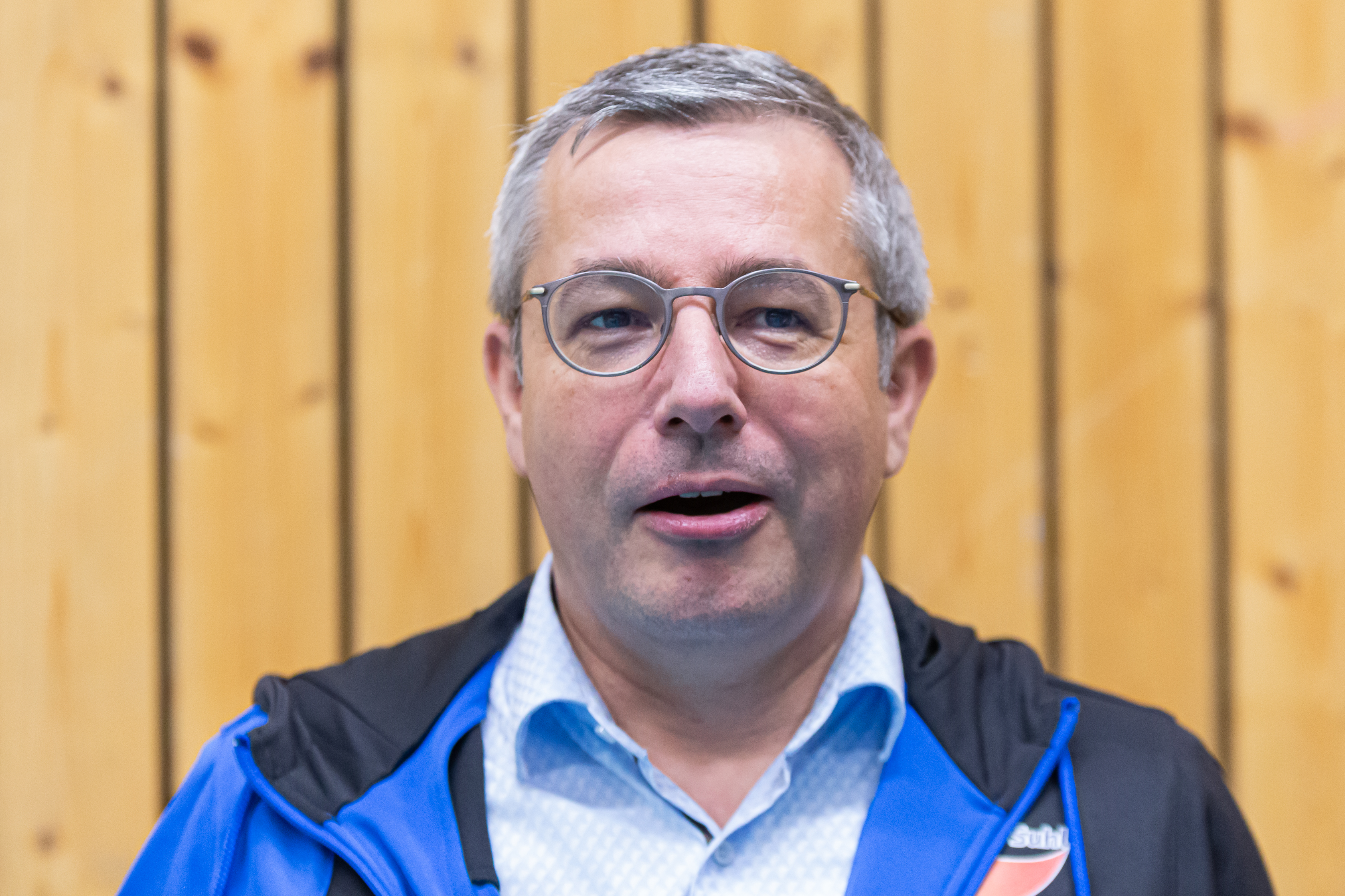 Volleyball, 1. Bundesliga Frauen, VfB 91 Suhl Lotto Thüringen - Schwarz-Weiss Erfurt; André Knapp (CDU, Oberbürgermeister von Suhl); Porträt, Einzelbild